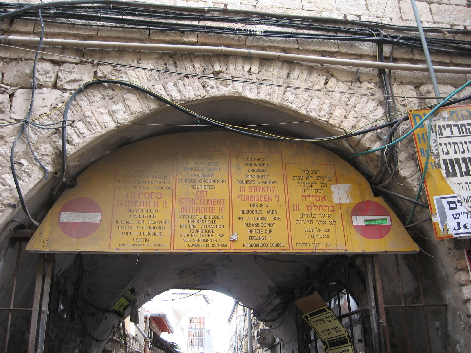 אחד משערי הכניסה לשכונת מאה שערים בירושלים